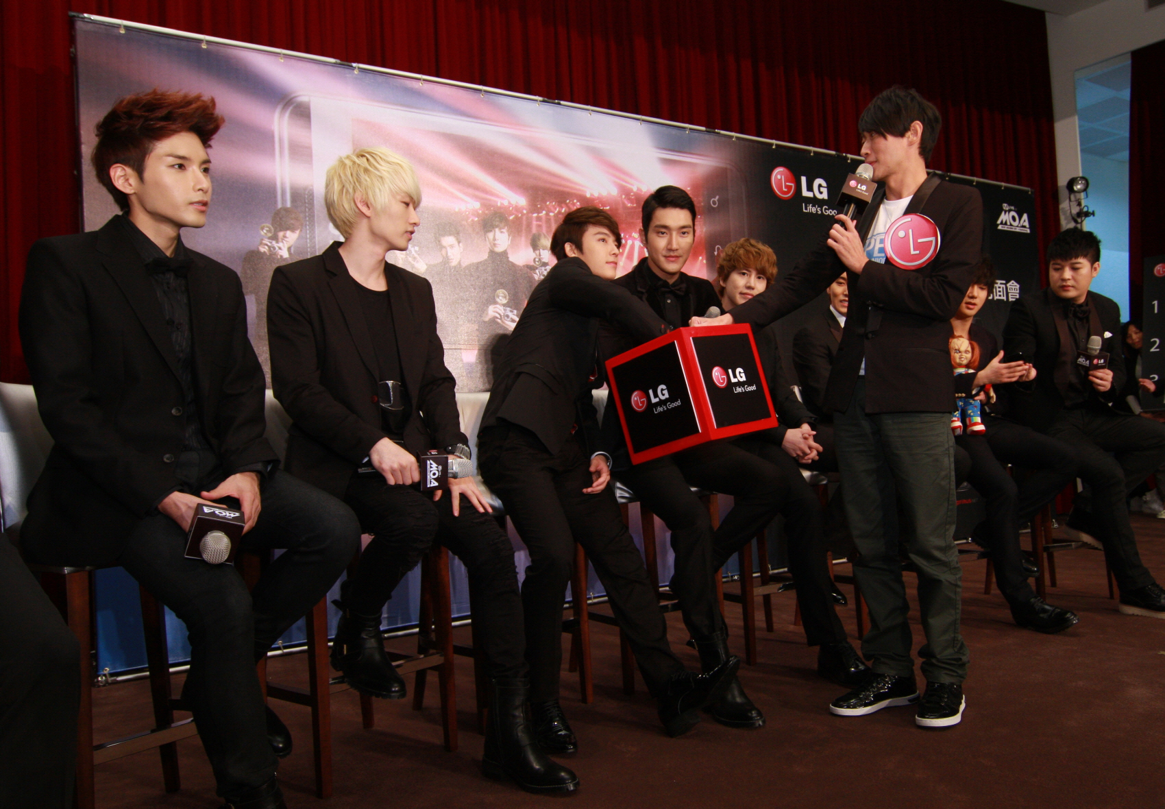 LG전자는 26일 저녁 대만 카오슝市에 위치한 '카오슝 아레나(Kaohsiung Arena)'에서 1만3천여 명의 관객이 운집한 가운데 열린 CJ주관 'M Live 콘서트'를 공식 후원했다. 콘서트에 앞서 공연장 인근 '샤또 데 신(CHATEAU de CHINE)' 호텔에서 LG 스마트폰 사용 고객 200명을 특별 초청해 'LG 옵티머스 슈퍼주니어 팬미팅' 행사를 개최했다. 슈퍼주니어 멤버가 기념촬영을 할 팬을 추첨하고 있다. ※ LG전자 뉴스룸 에서 관련 보도자료를 확인실 수 있습니다.